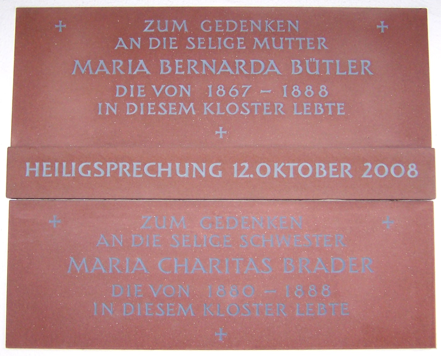 Gedenktafel der heiligen Maria Bernarda Bütler und der seligen Maria Charitas Brader an der Kirchen-Ausserwand des Klosters Maria Hilf in Altstätten, Kanton St.Gallen, Schweiz. Beide Schweizer Ordensfrauen lebten in diesem Kloster und gingen 1888 als Missionarinnen nach Südamerika, wo sie franziskanische Ordenskongregationen gründeten.